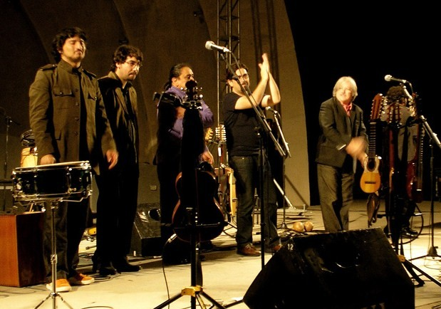 Inti-Illimani en un concierto